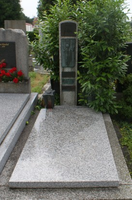 Grab Josef Klaus-Grinzinger Friedhof